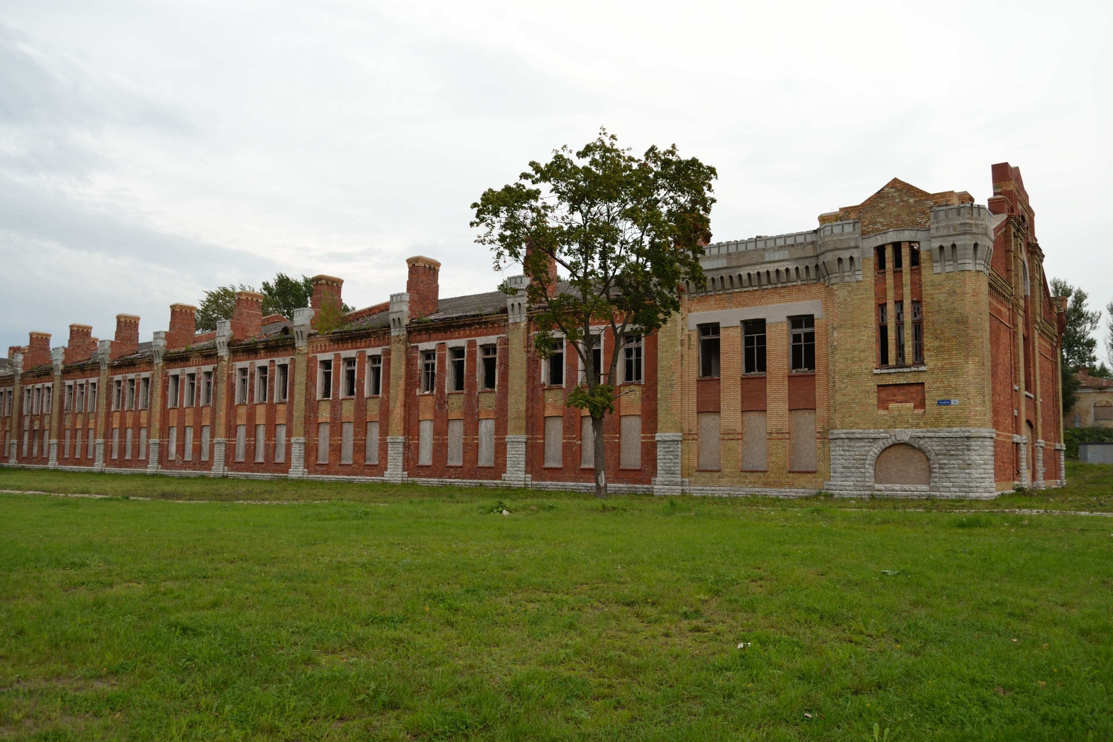 Tondi sõjaväelinnaku kasarm Tondi 53, 1915-1916